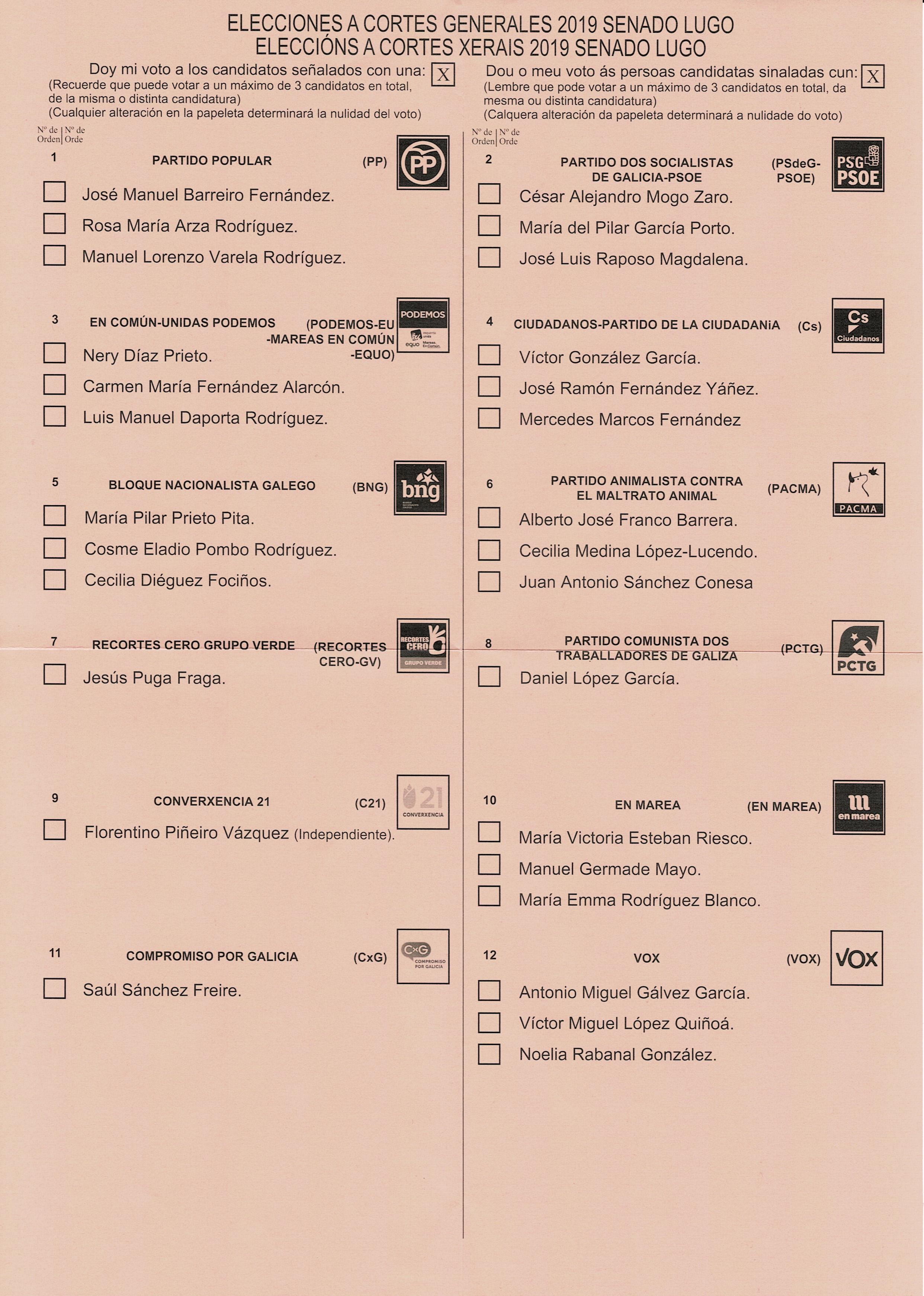 Eleccións a Cortes Xerais 2019 Senado Lugo